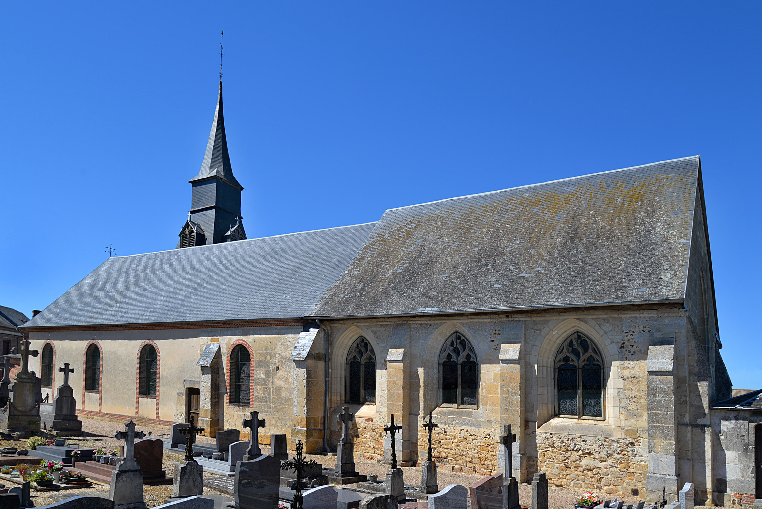 Livarot-Pays-d'Auge (Meulles - Calvados)